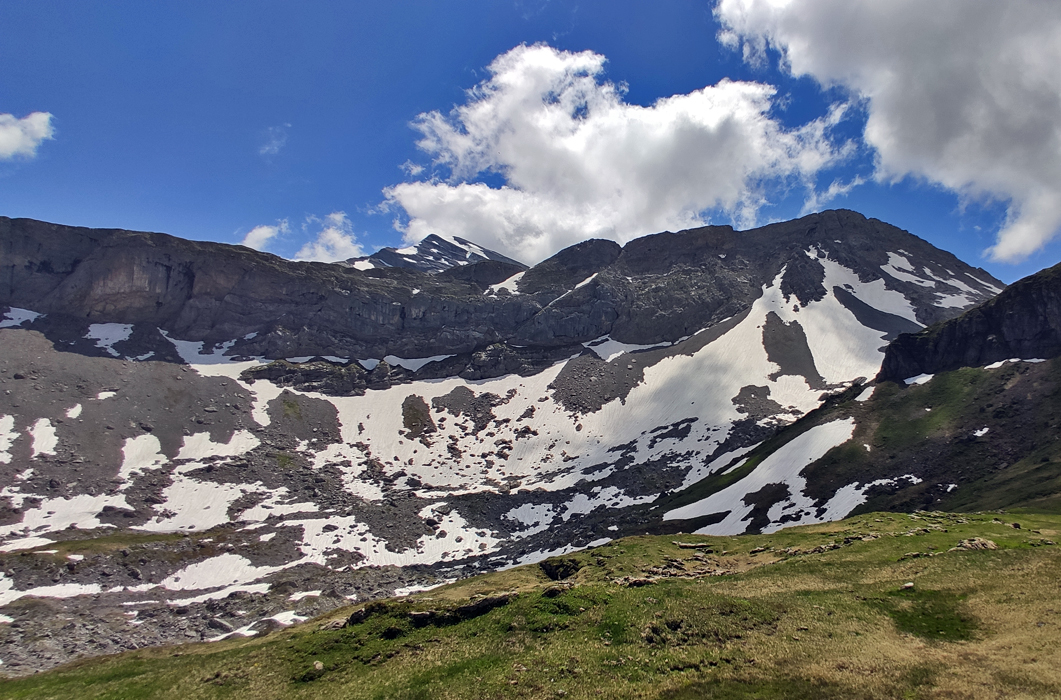 Der Chratzerengrat mit seinem höchten Punkt (rechts)